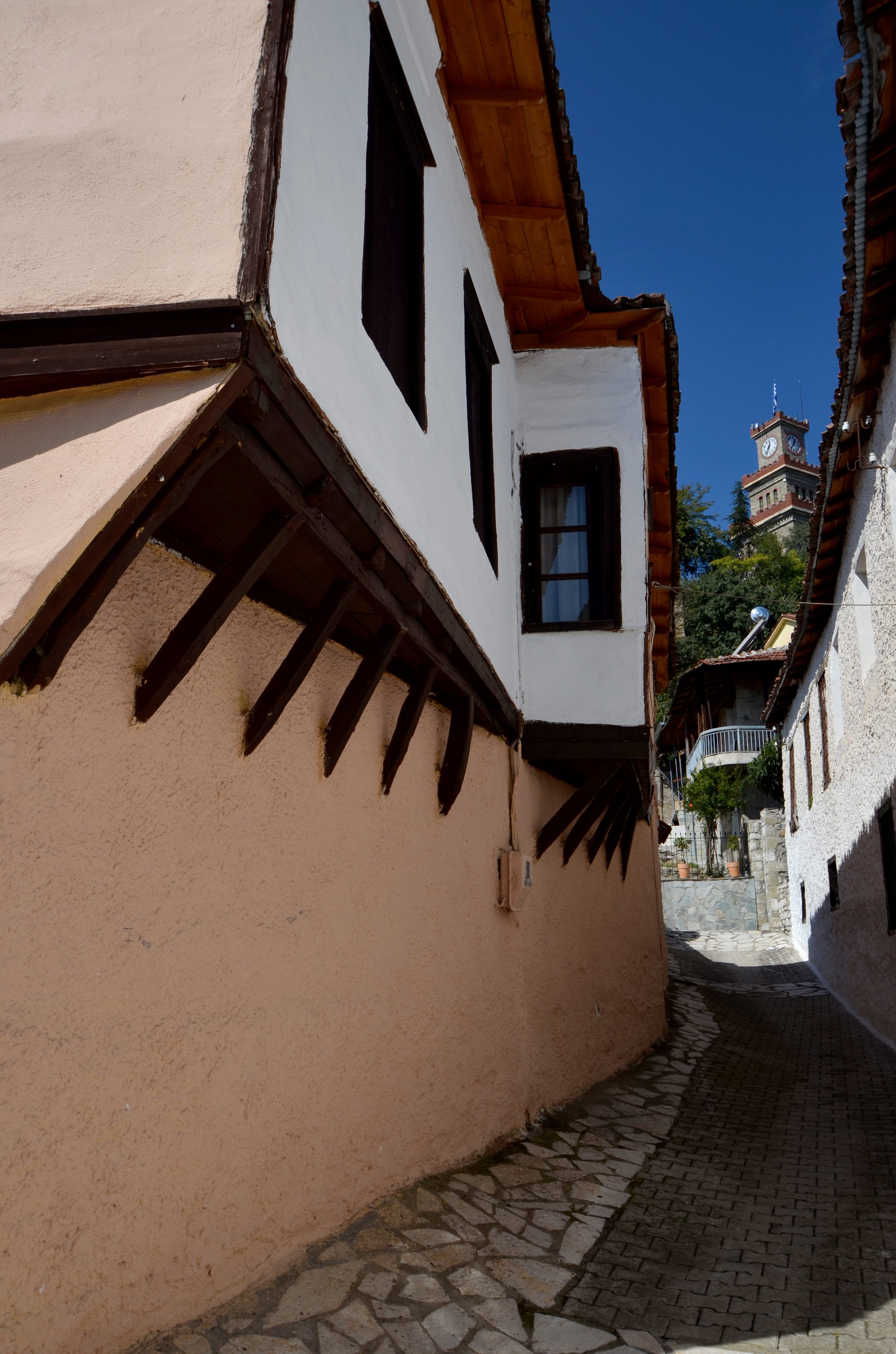 Βυζαντινό Κάστρο Τρικάλων, παλιά πόλη Βαρούσι«Βυζαντινό Κάστρο Τρικάλων, παλιά πόλη Βαρούσι»